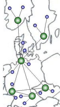 Gatenetzwerk in der Logistik